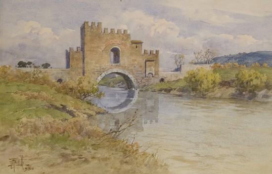 Filippo Anivitti, acquarello su carta. Veduta del Ponte Nomentano